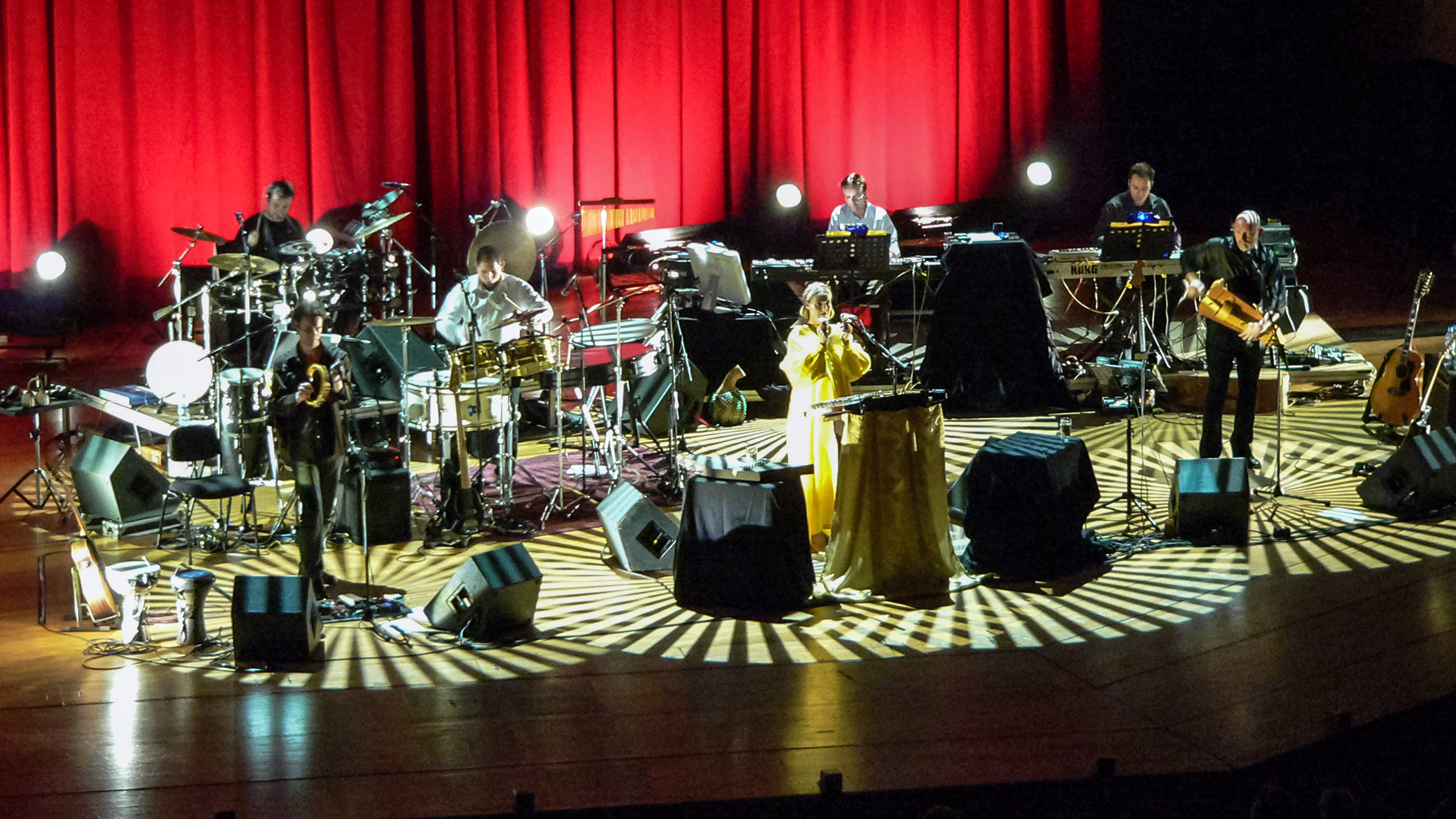 Dead Can Dance Konzert in München am 27.03.05